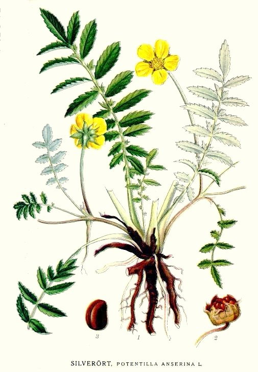 Potentilla anserina L. Original Description Silverört, Potentilla anserina L.